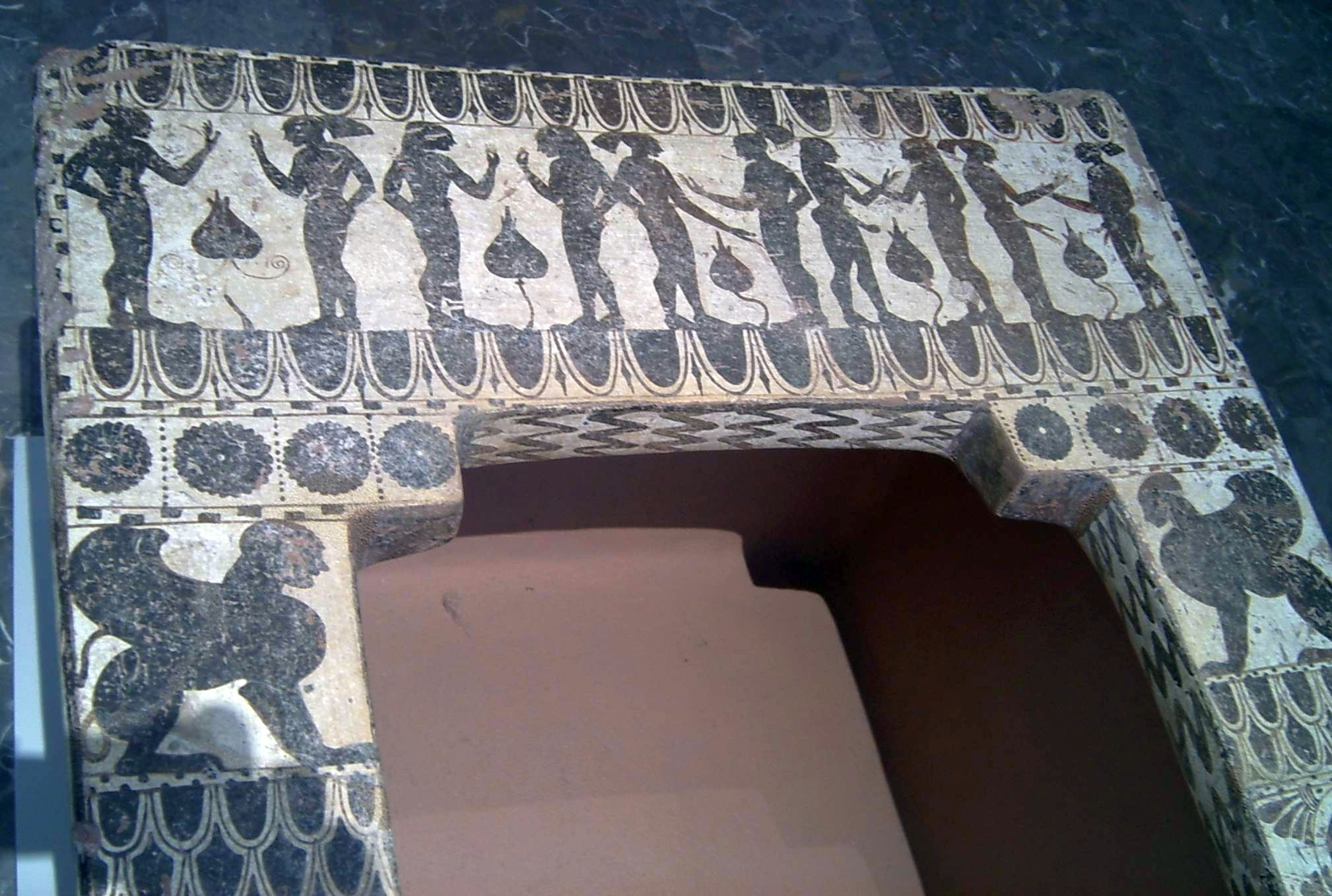 Klazomenischer Sarkophag aus Klazomenai mit homoerotischer Szene adeliger Jünglinge im Kopfteil; um 515/10 v. Chr., Länge 195 cm, Breite 74/62 cm, Tiefe 33,5 cm; bemalt im schwarzfigurigen Stil; Inv.-Nr.: 30030, Antikensammlung Berlin/Altes Museum